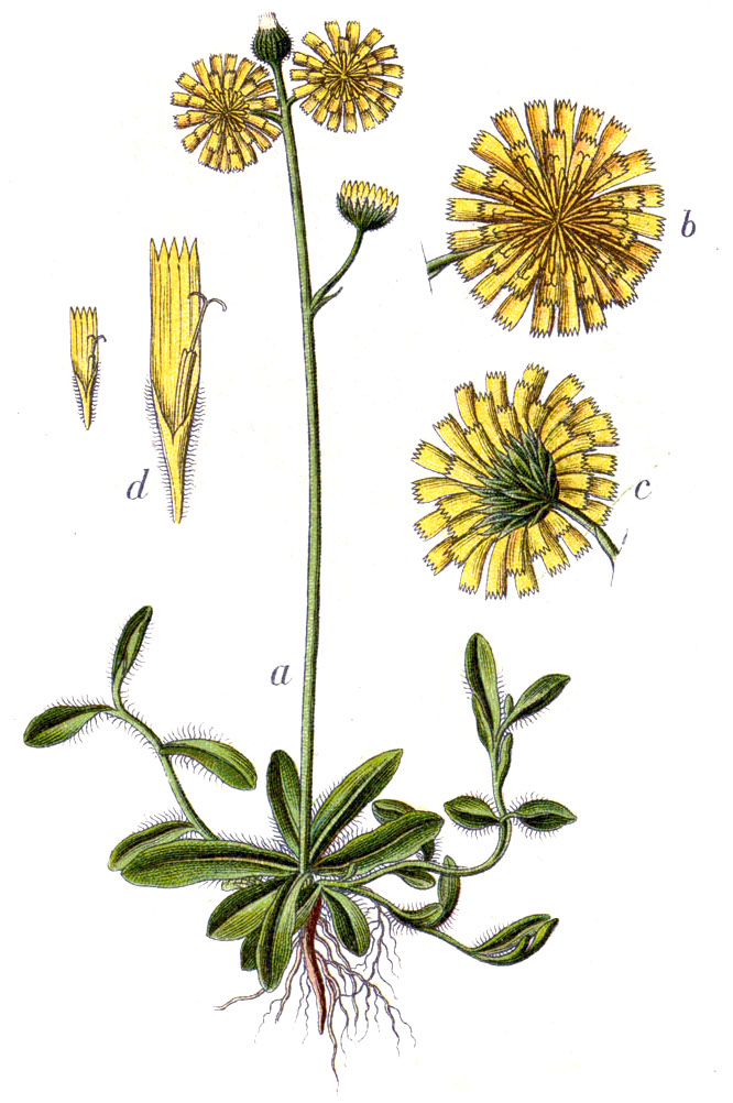 Hieracium lactucella Wallr., syn. Hieracium auricula auct. non L. Original Caption Echtes Mauseohr, Hieracium auricula